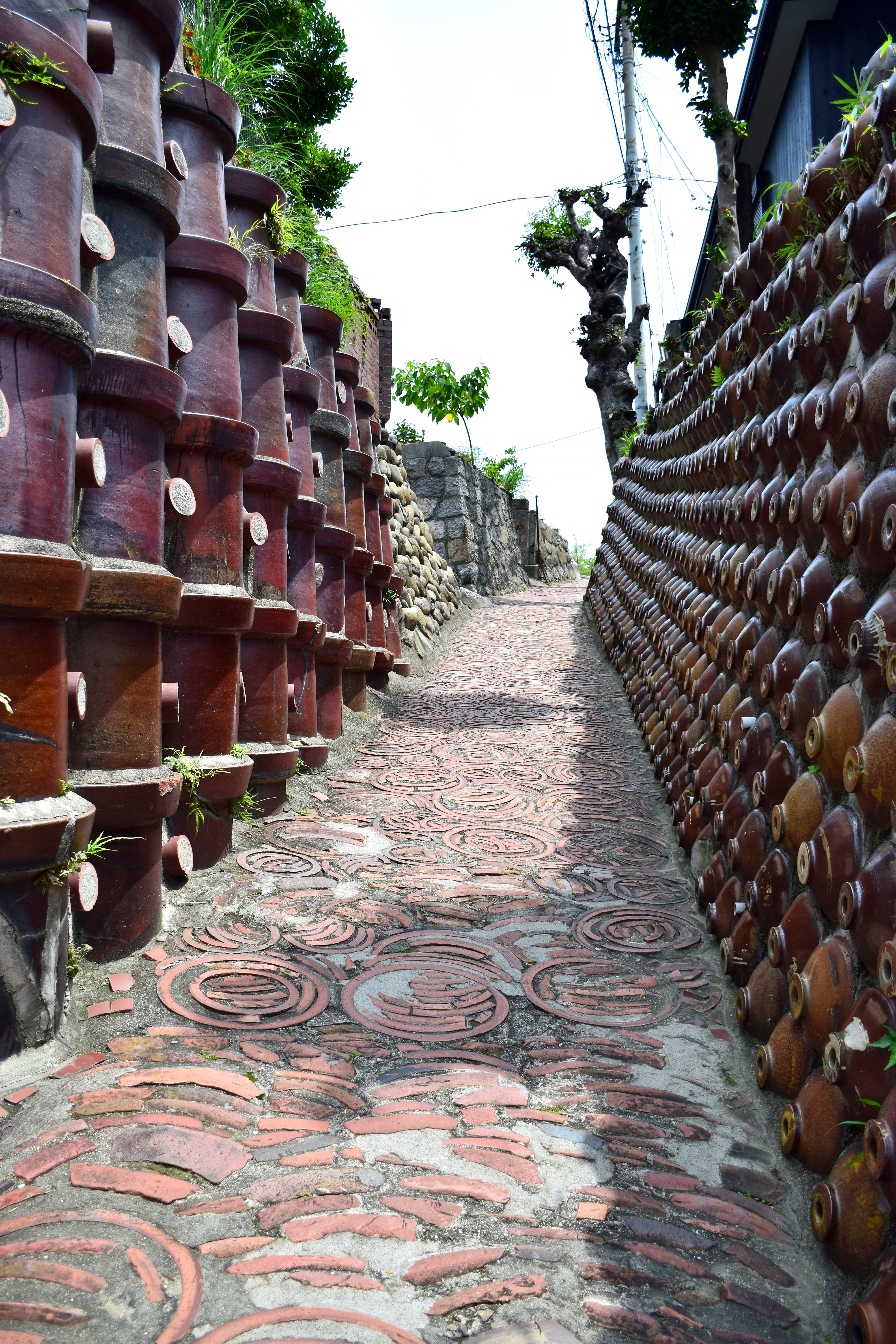 やきもの散歩道